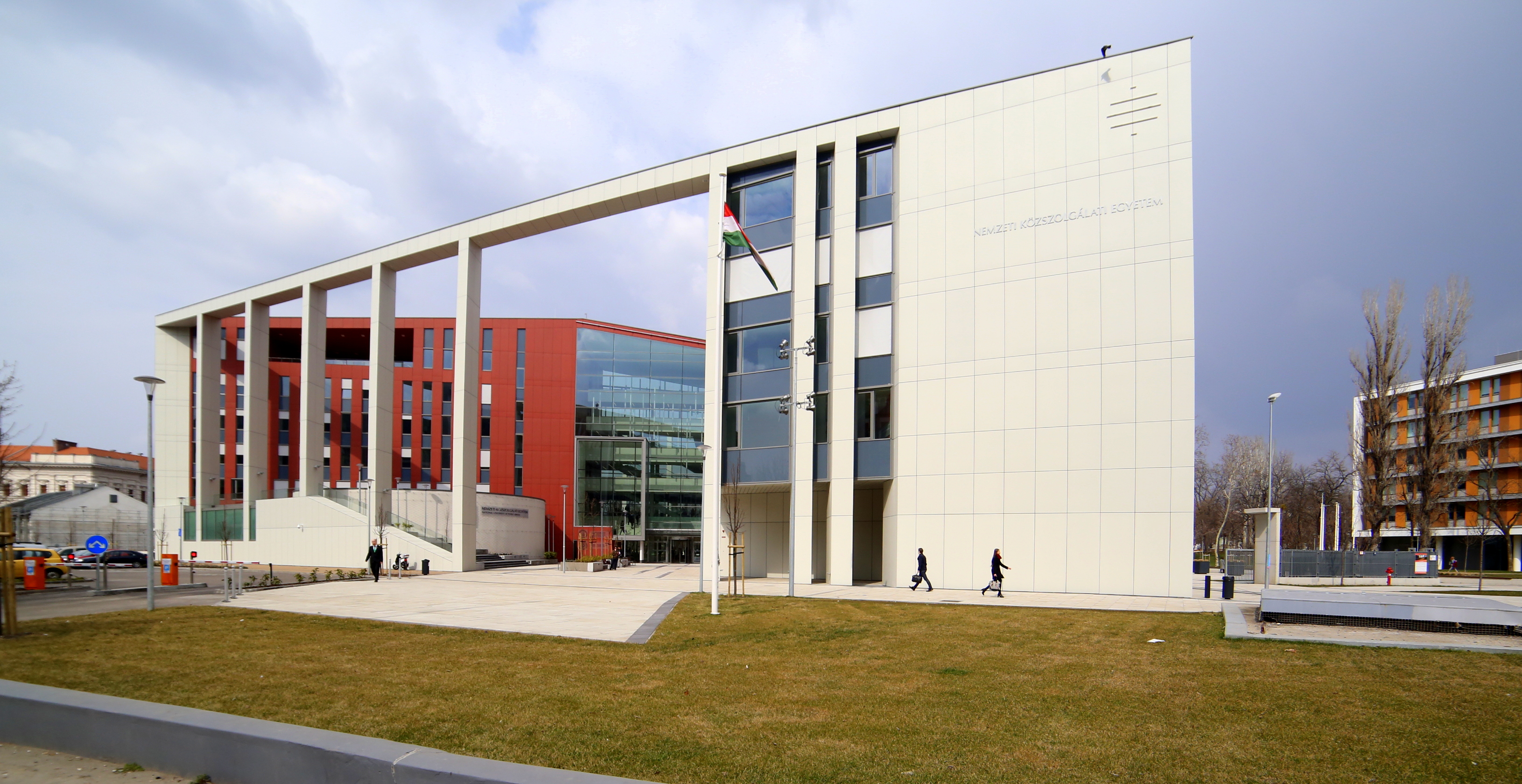 Nemzeti Közszolgálati Egyetem Ludovika Campus új épülete